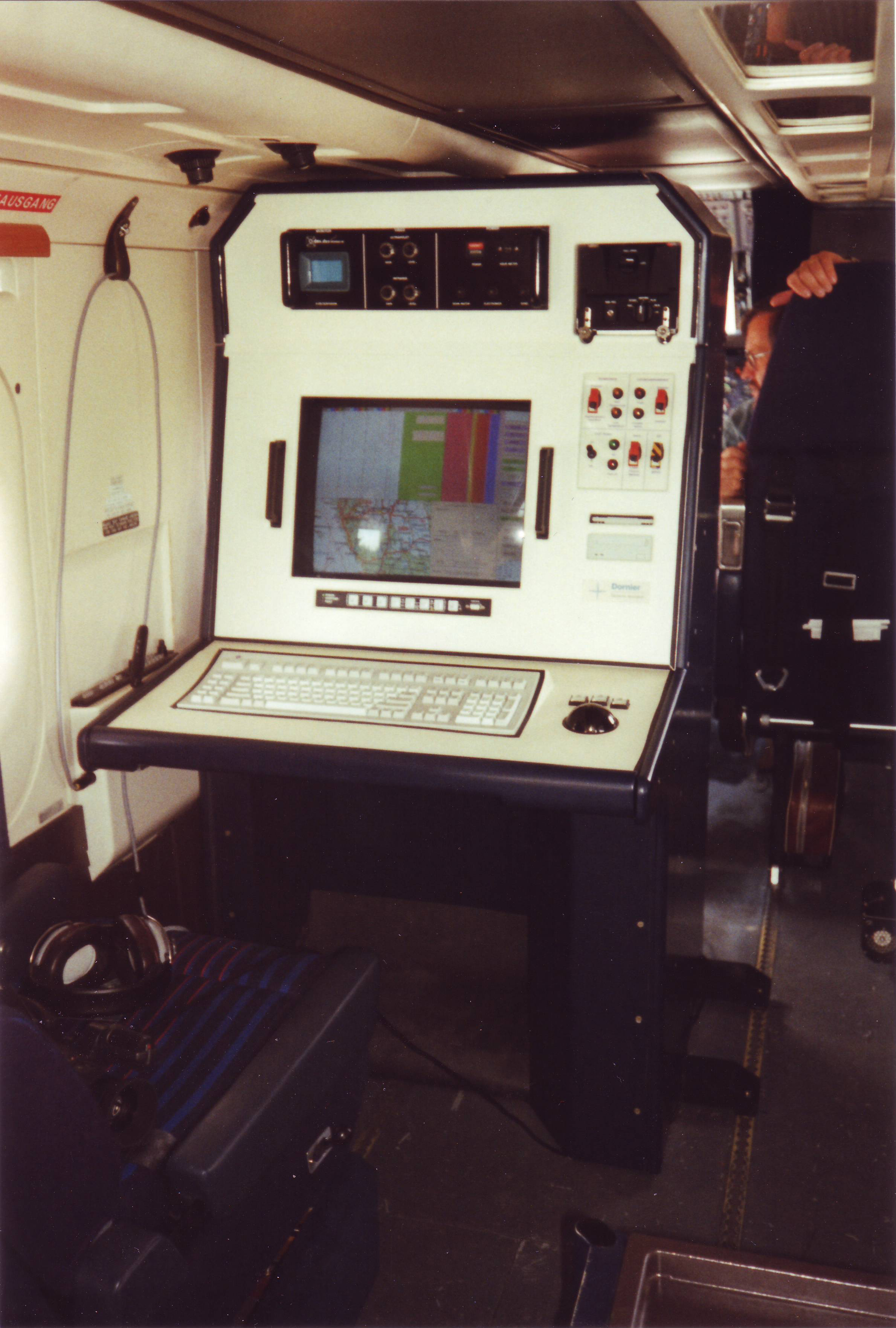 Operatorenstation in Oelüberwachungsflugzeug Do 228; Scan eines Bildes aus dem Jahr 1993